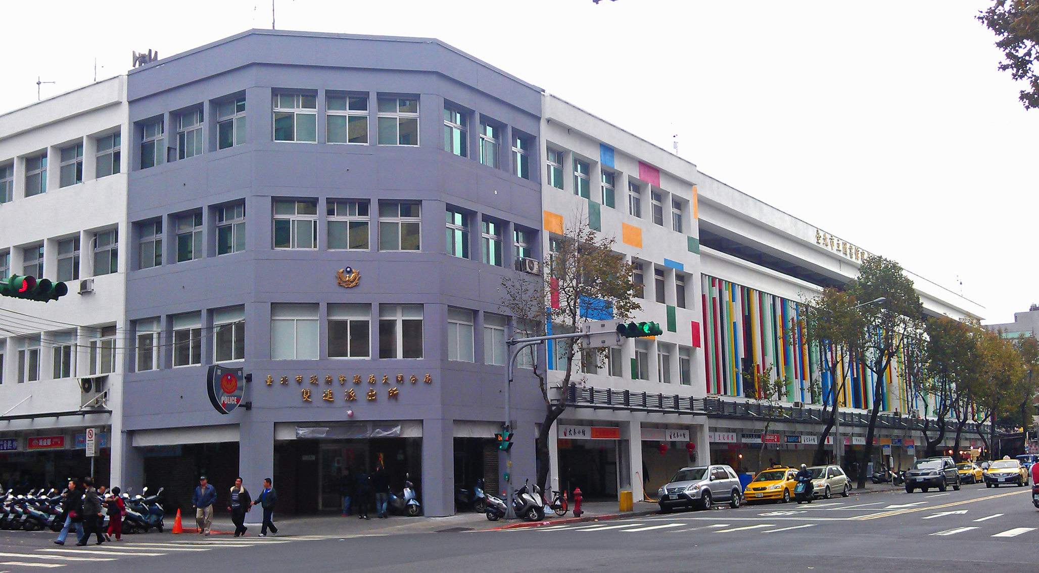 雙連市場、臺北市立圖書館建成分館、臺北市政府警察局大同分局雙連派出所。